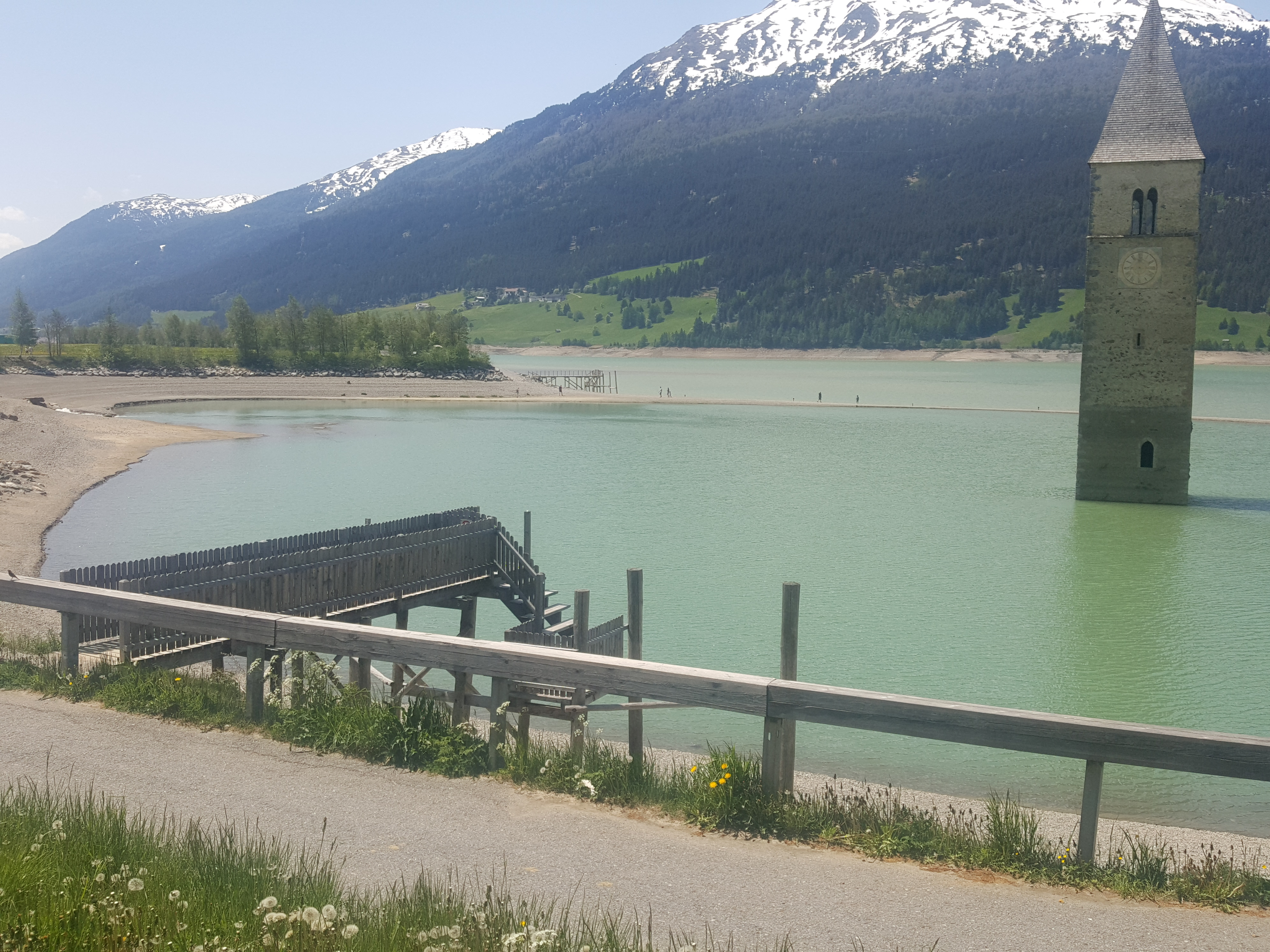 Reschensee bei Niedrigwasser